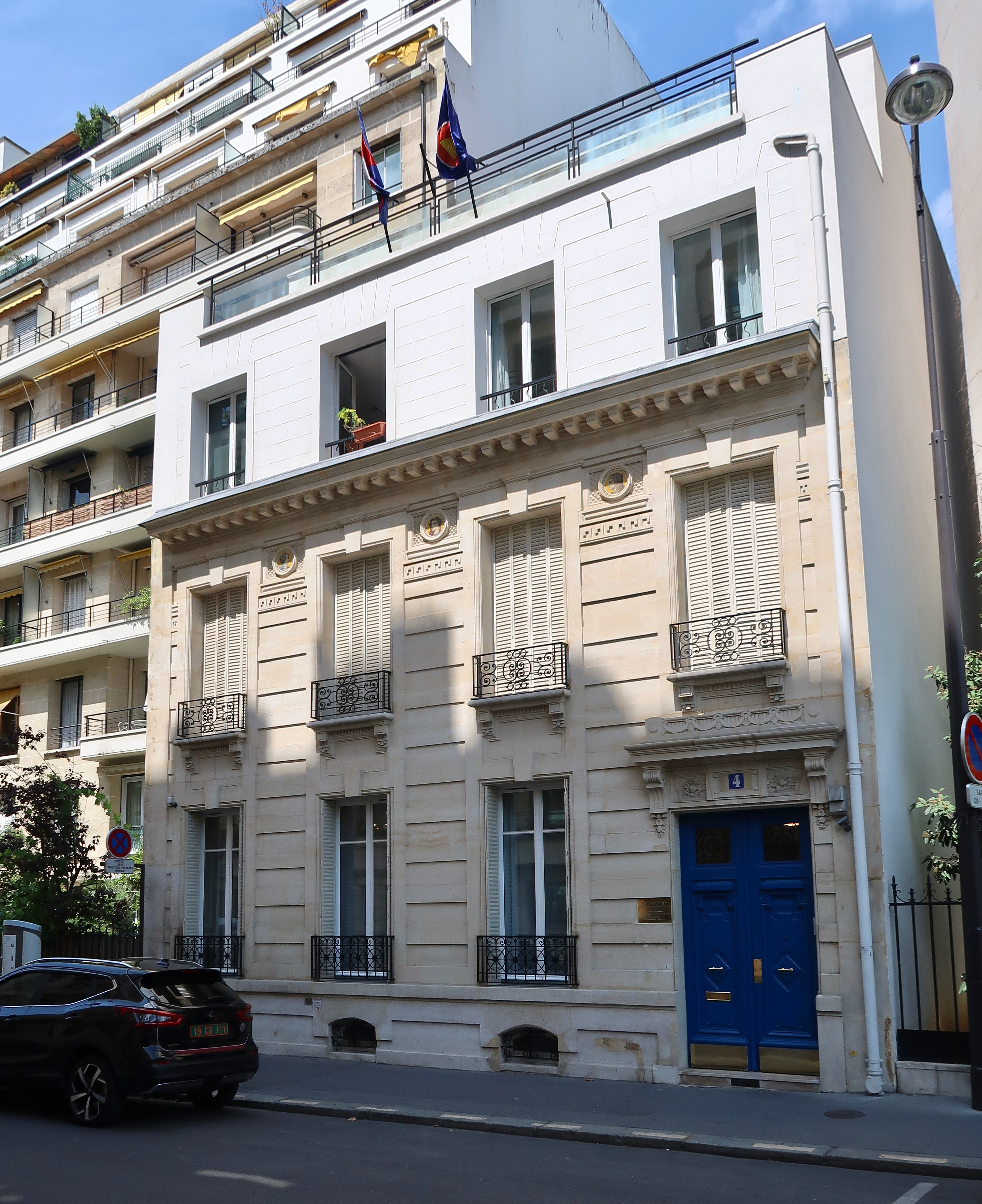 Ambassade du Cambodge en France, 4 rue Adolphe-Yvon (Paris, 16e).